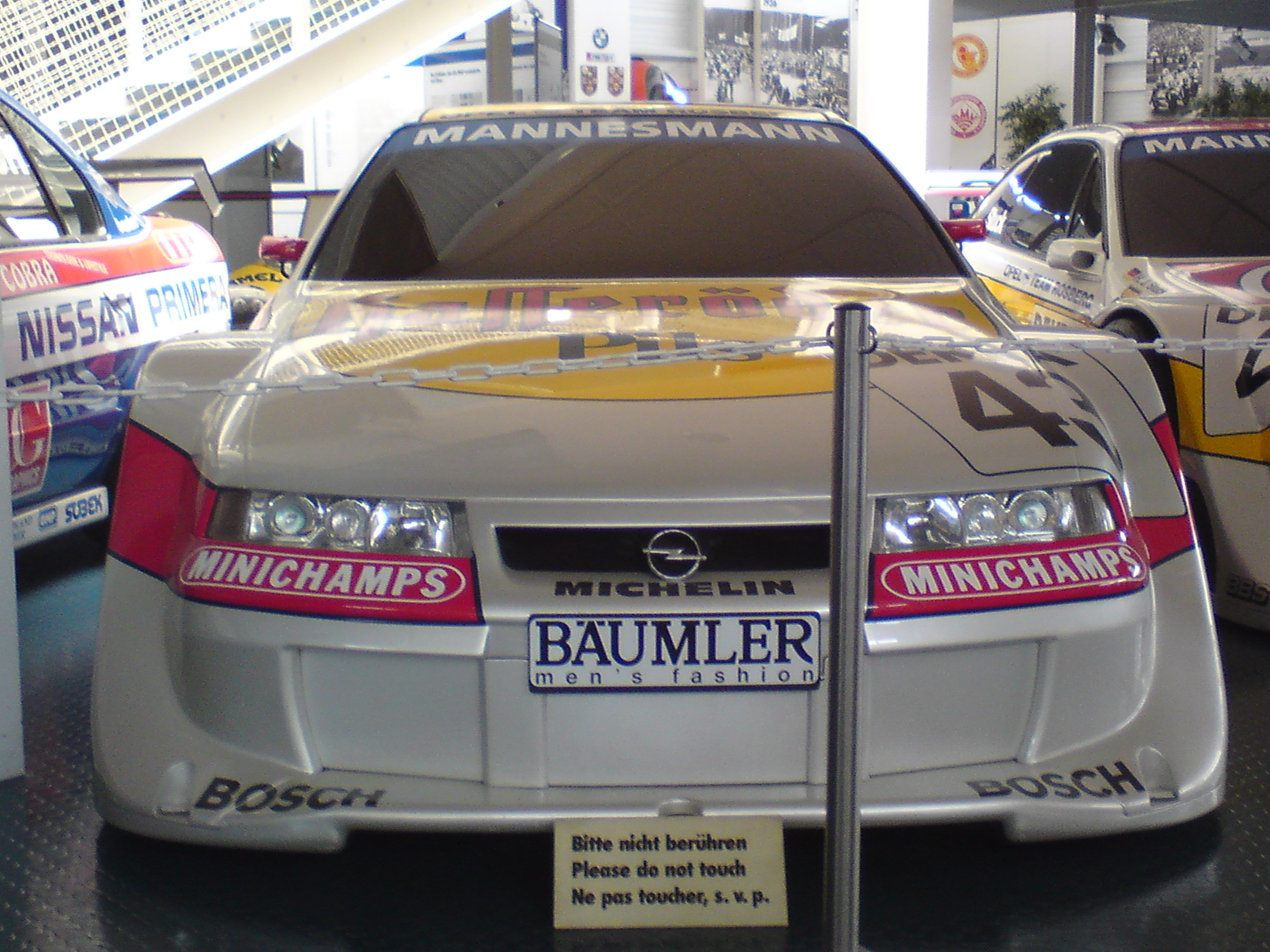 Calibra Silhouette im Motorsport Museum Hockenheim Team Rosberg